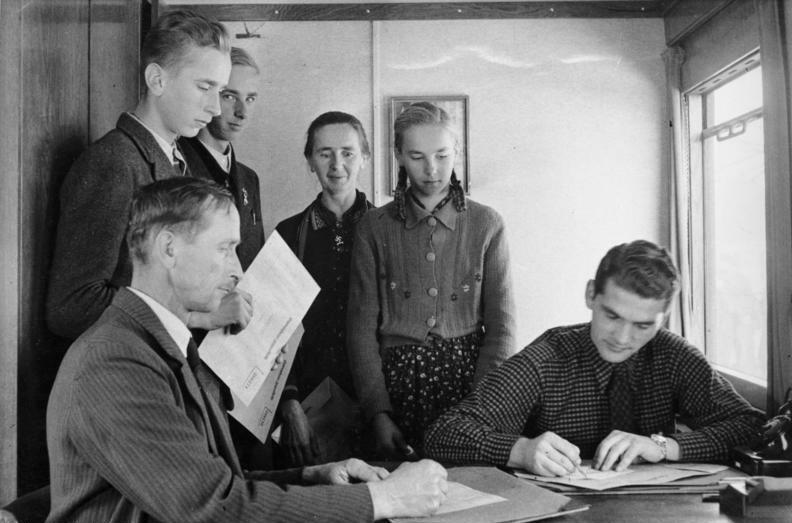 Umsiedlung Gottschee, Ausweisstelle Umsiedlung Gottschee: Herdgemeinschaft Gliebe in der Ausweisstelle [Gottschee.- Deutschstämmige Umsiedlerfamilie in der Ausweisstelle.]